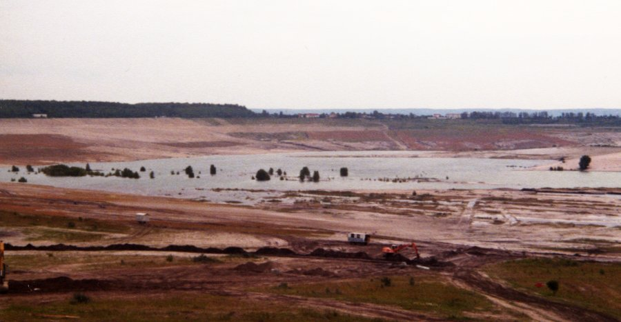 Tagebaurestloch von Nachterstedt Das Tagebaurestloch entstand, als zu DDR-Zeiten auch dieses relativ kleine Braunkohlflöz abgebaut wurde. Nach der Auskohlung wurde zuerst der nordwestliche Bereich in ein Naturschutzgebiet umgewandelt. Zur Zeit der Aufnahme wurde gerade der restliche Bereich für ein Naherholungsgebiet vorbereitet. Die Böschungen wurden abgeschrägt und die Flutung vorbereitet.